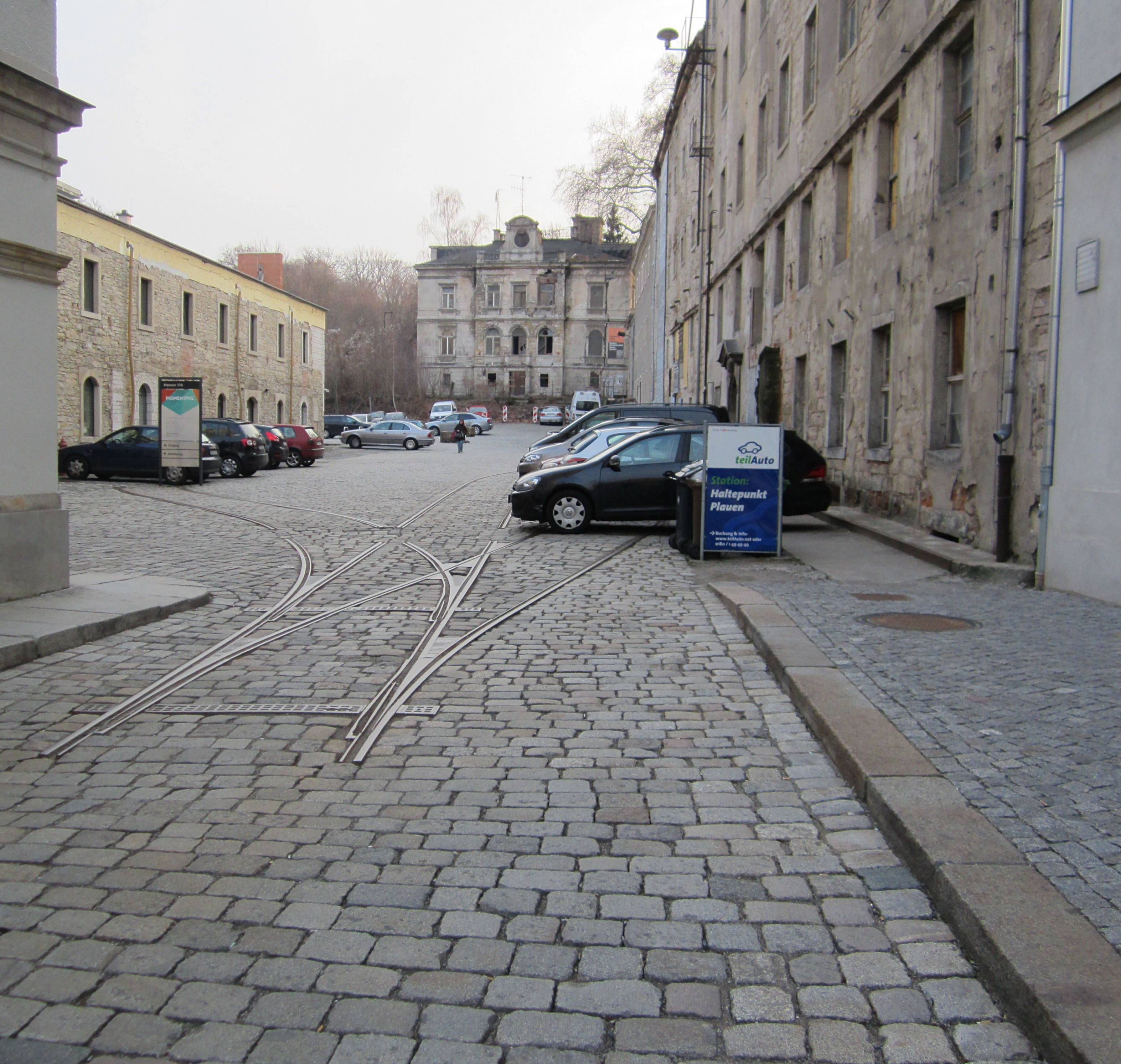 Blick von Altplauen in den Hof der Bienertmühle